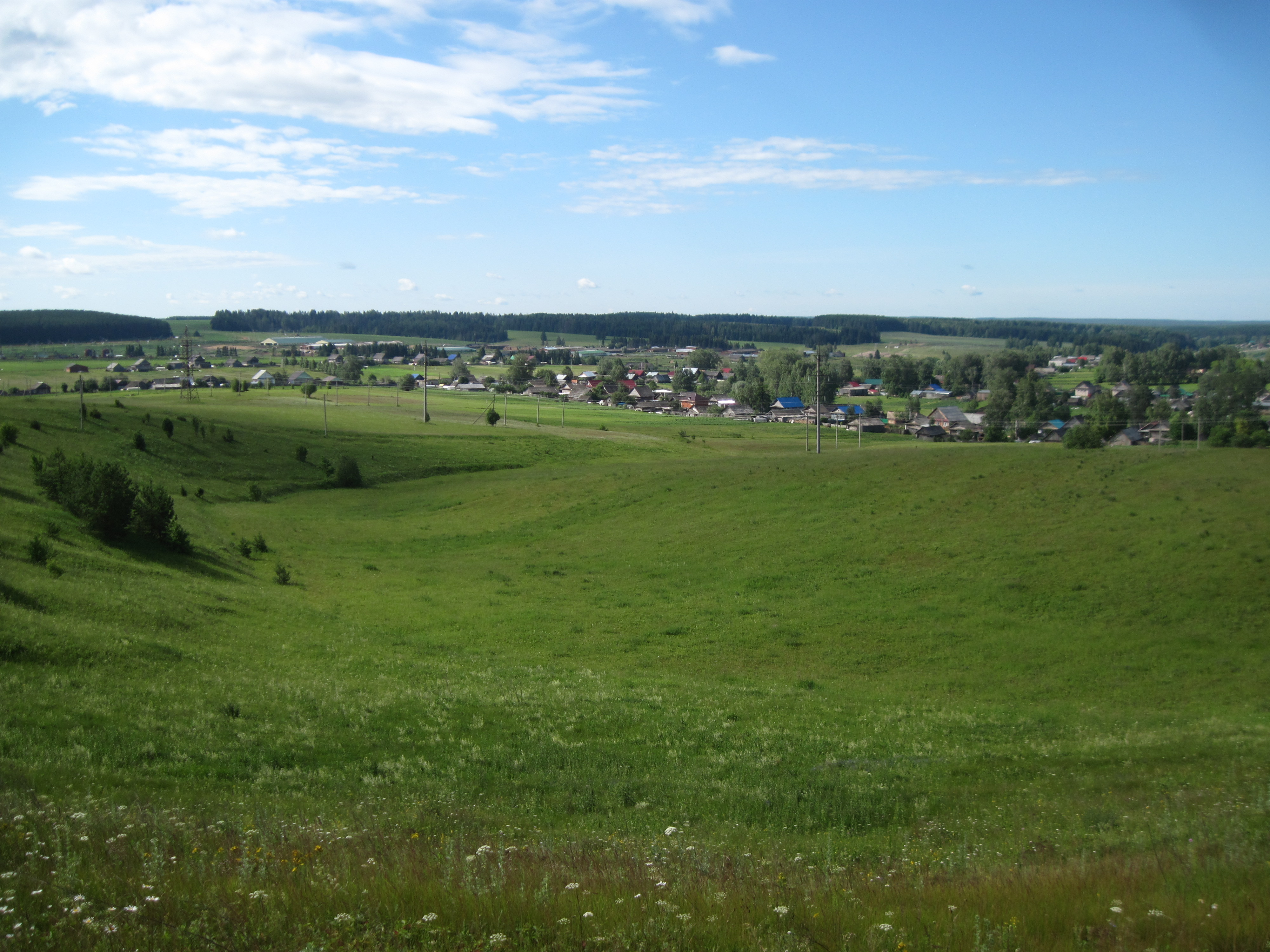 Шарканский район,Быгинское сельское поселение